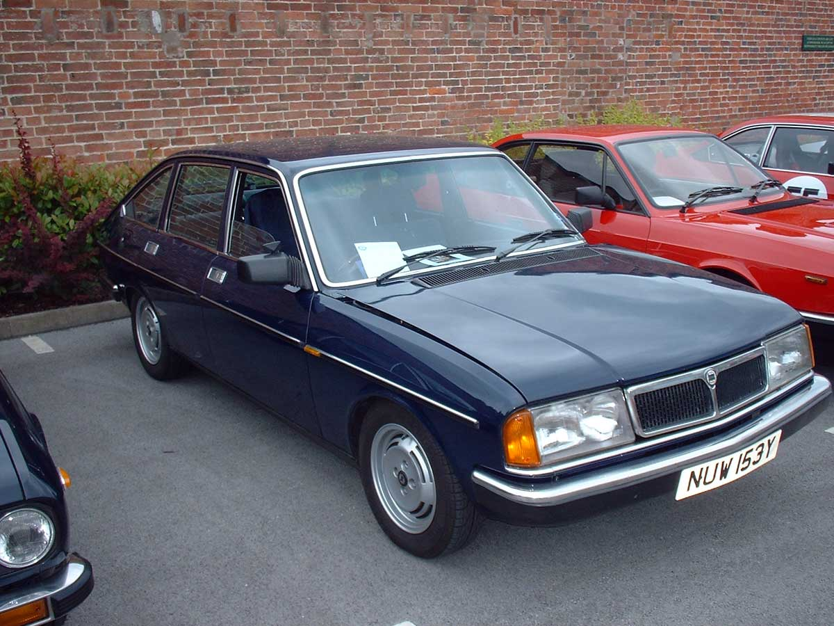 Lancia Beta Saloon S3 Lancia Motor Club AGM 2004